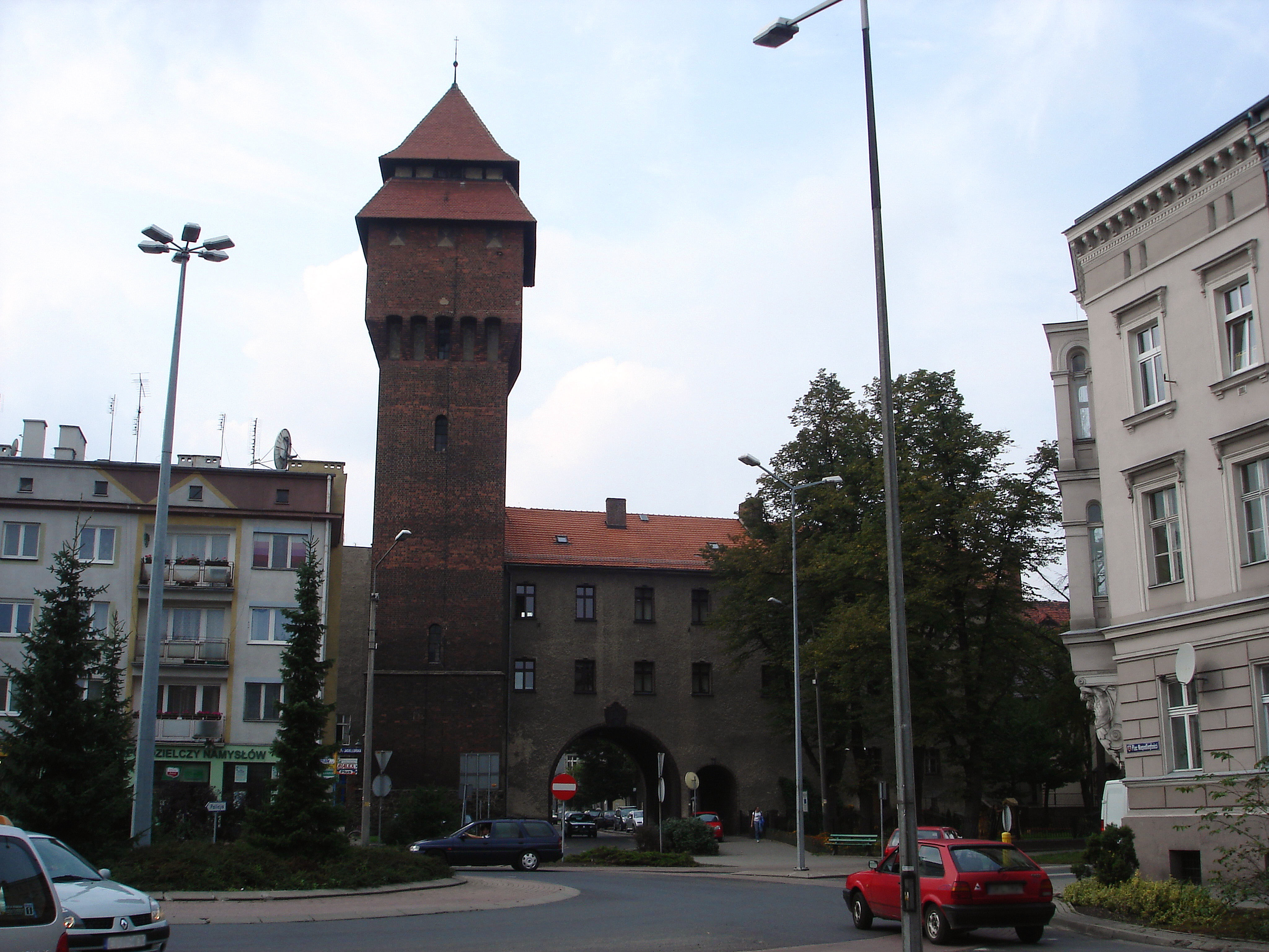 Wasserturm von Kluczbork. Template:Pl=Wieża ciśnień w Kluczborku.